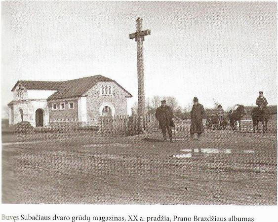 Subačiaus magazinas XX a. pr.